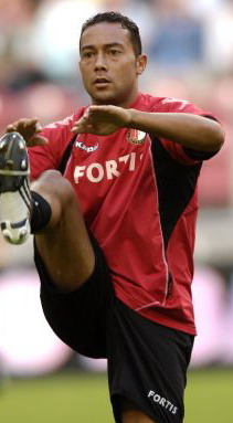 Danny Landzaat Feyenoord